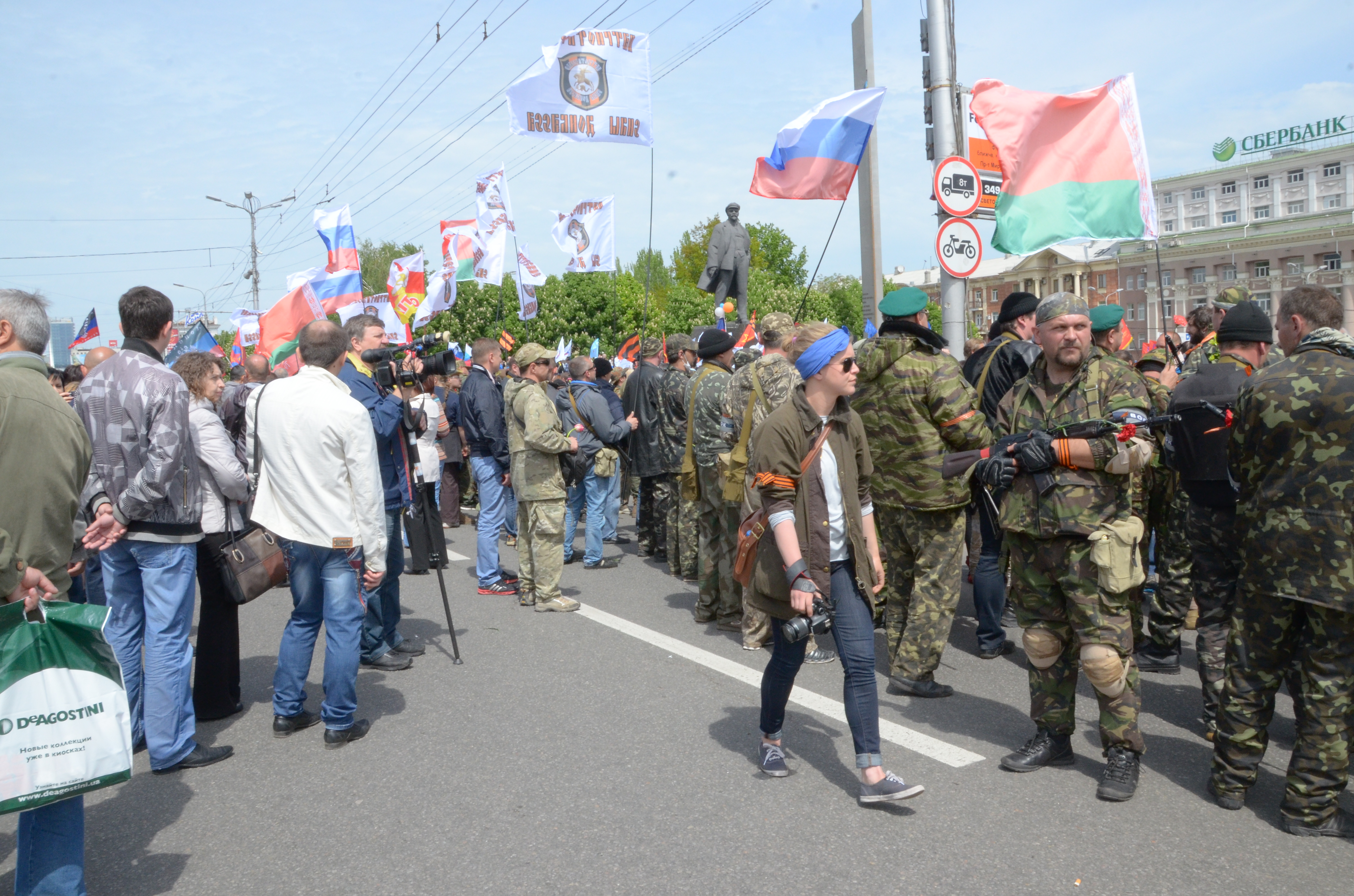 День Победы в Донецке